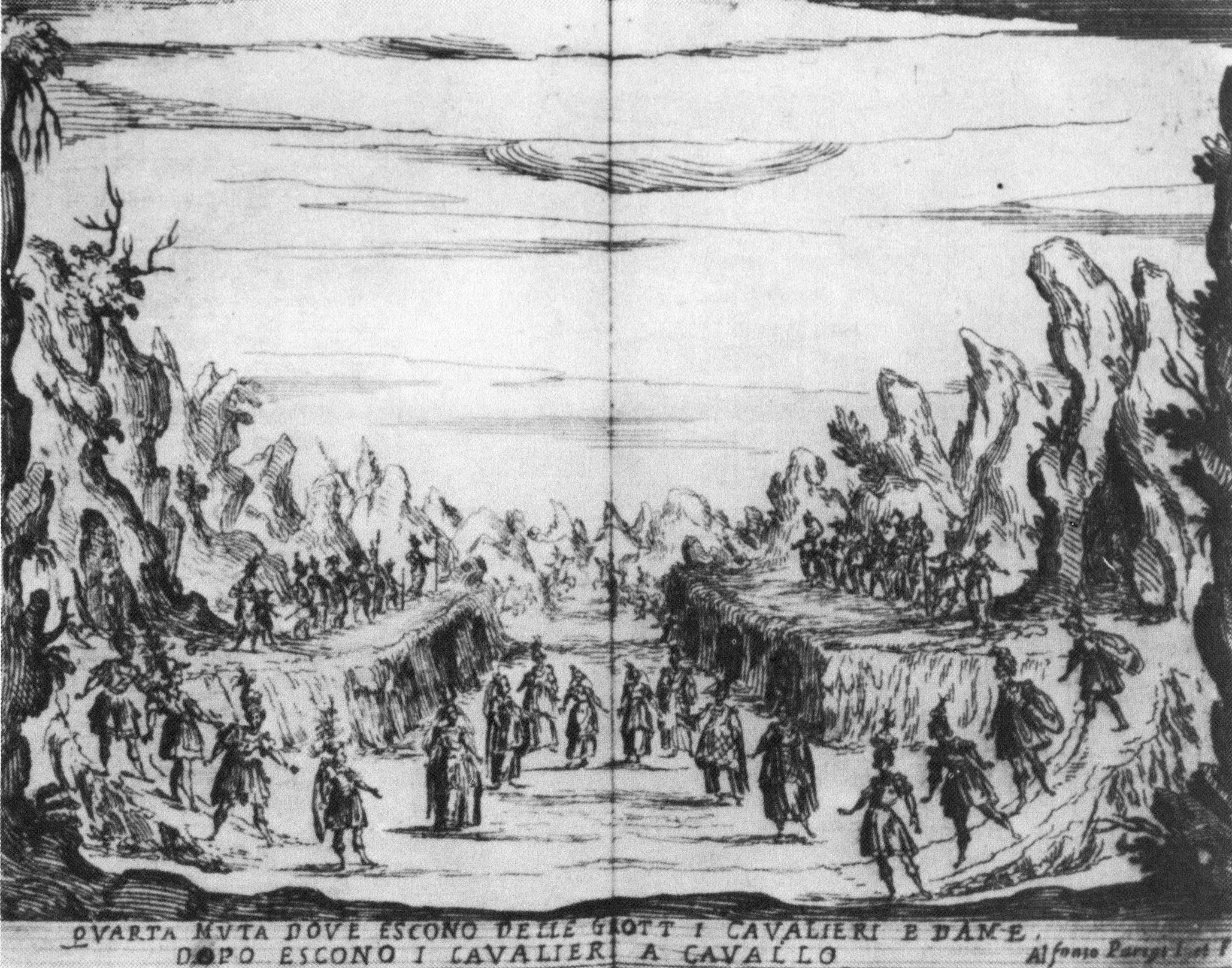 Francesca Caccini - La liberazione di Ruggiero dall'isola d'Alcina - Quarta muta dove escono delle grott i cavalieri e dame, dopo escono i cavalieri a cavallo - Rocky landscape